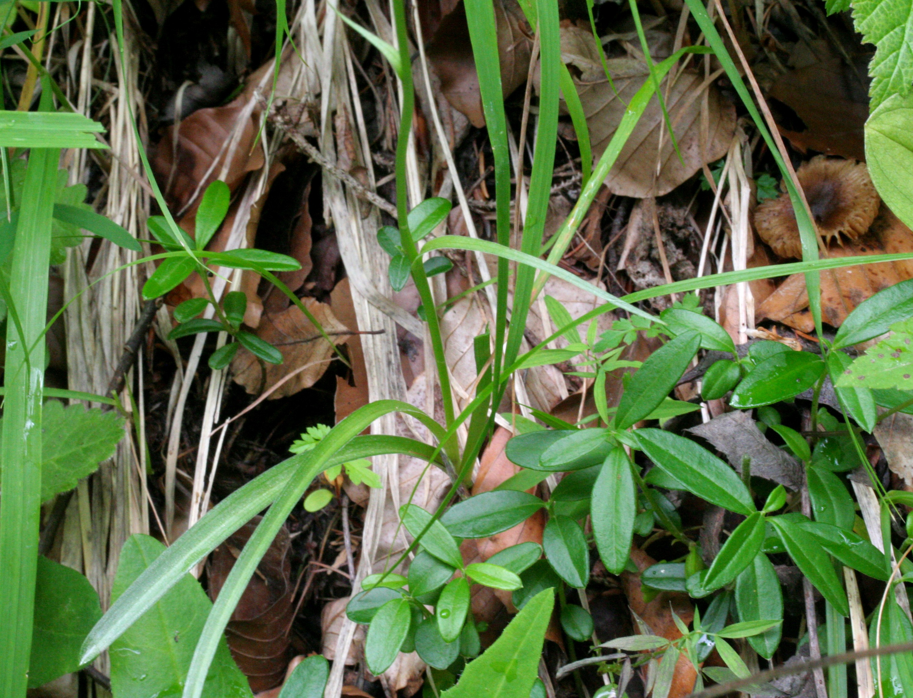 Manina profumata - Località: Cortina (BL), 1400 m s.l.m.